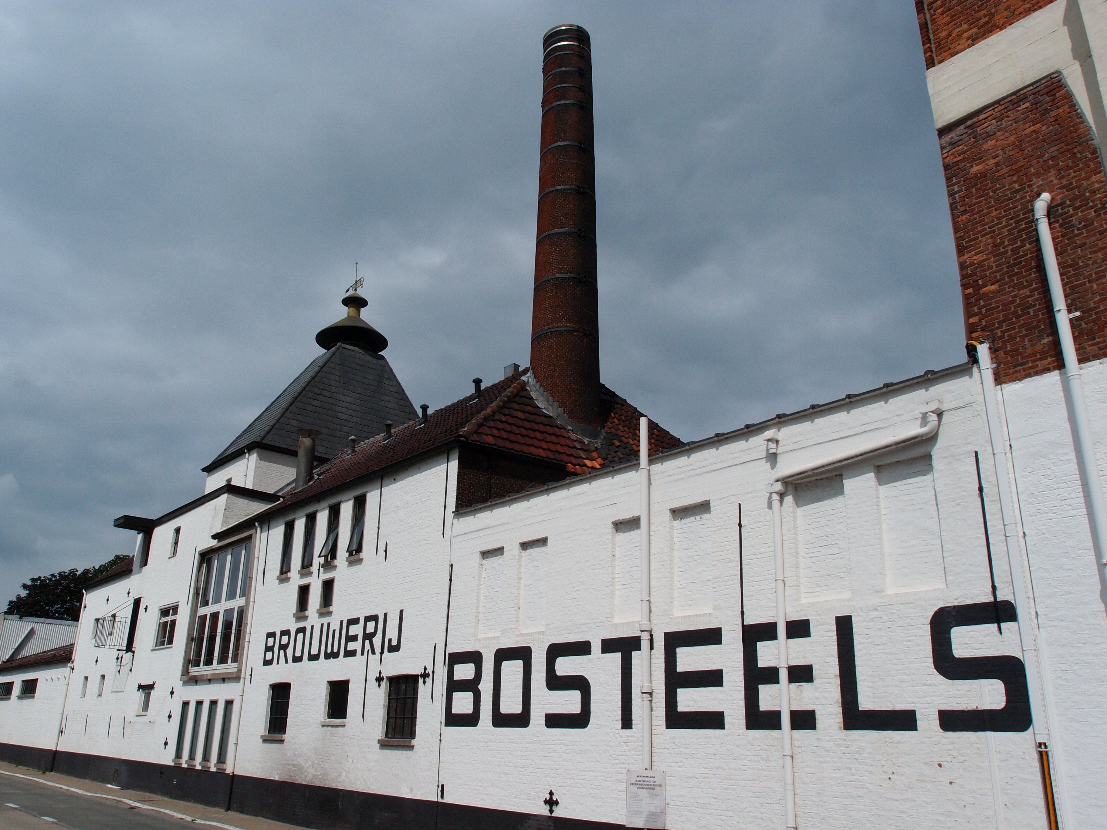 Teilansicht der belg. Familienbrauerei Bosteels in Buggenhout Datum: 29.05.2014 Urheber: M. Pfeiffer alias Benutzer:Gordito1869 Quelle: Privates Fotoarchiv des Urhebers